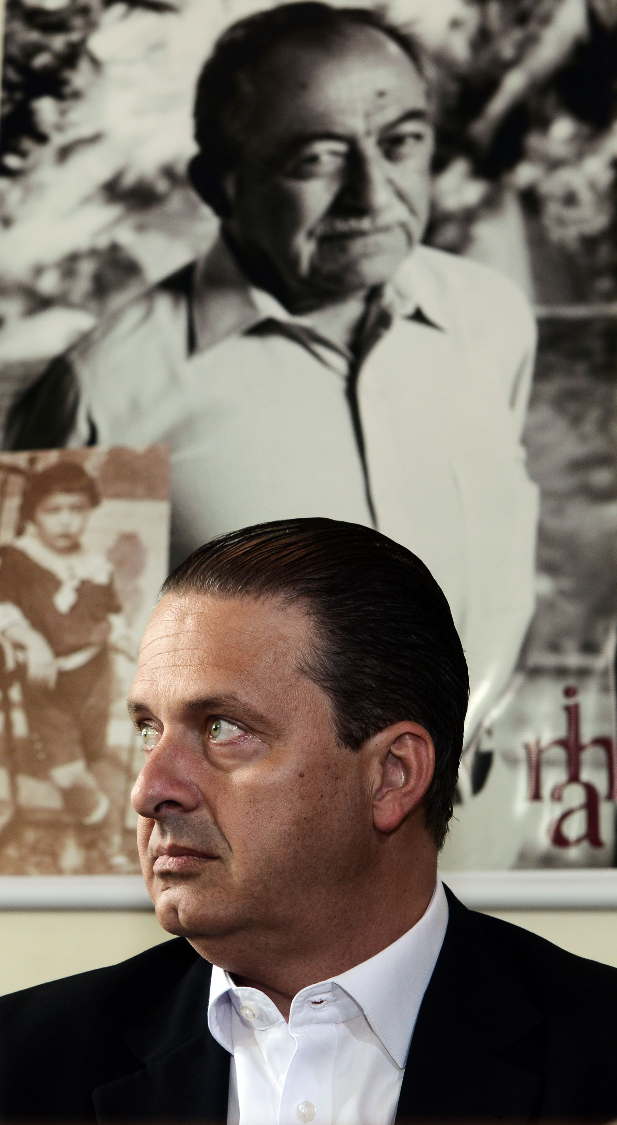 16.12.13 Abertura do processo de tombamento do acervo do ex-governador Miguel Arraes. Foto: Aluisio Moreira/SEI